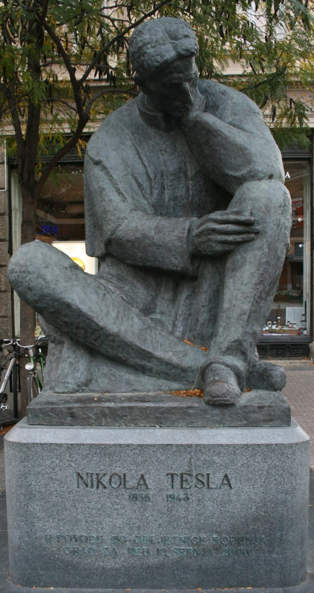 kip Nikole Tesle u istoimenoj ulici u Zagrebu, rad Ivana Meštrovića